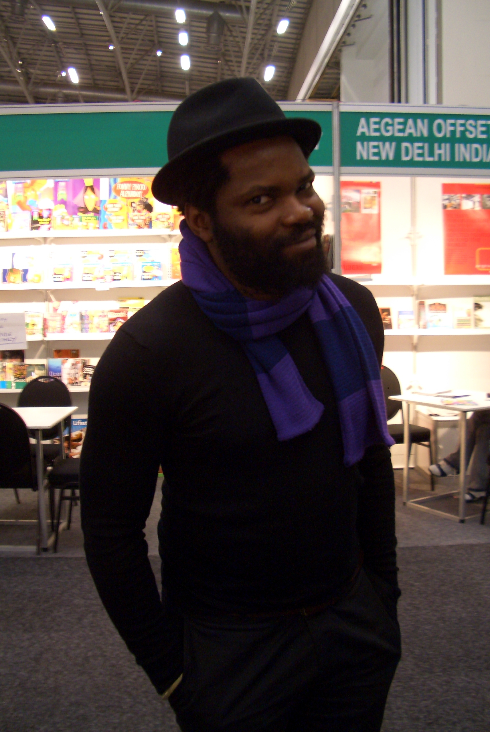 Ntone Edjabe